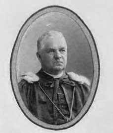 Portrait of Benjamin Pâquet (1832-1900), priest.